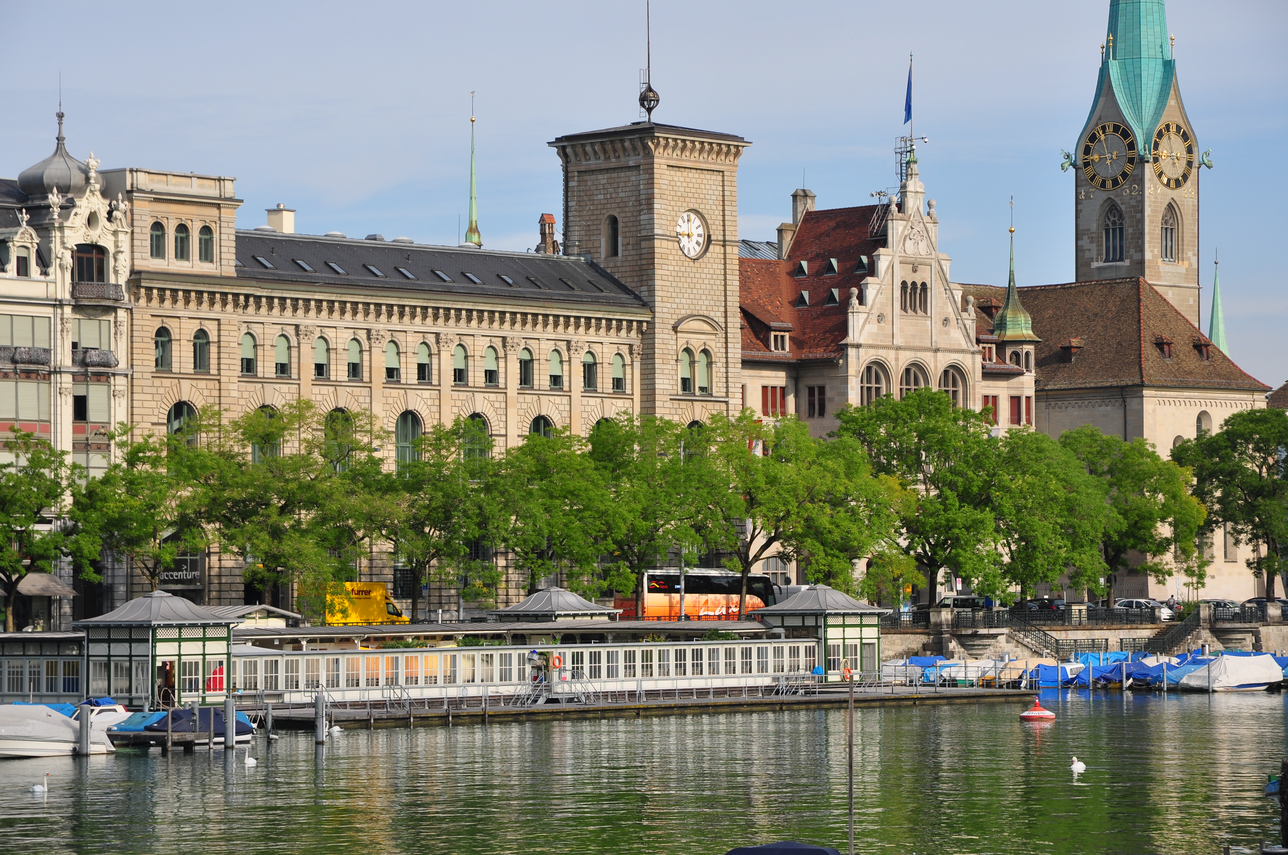 View from Quaibrücke (Quai bridge) in Zürich (Switzerland) towards Zürichsee : Frauenbadi [lido for women]; in the Limmat river, Stadthausquai and Fraumünsterpost, Stadthaus Zürich [city government] and Fraumünster.